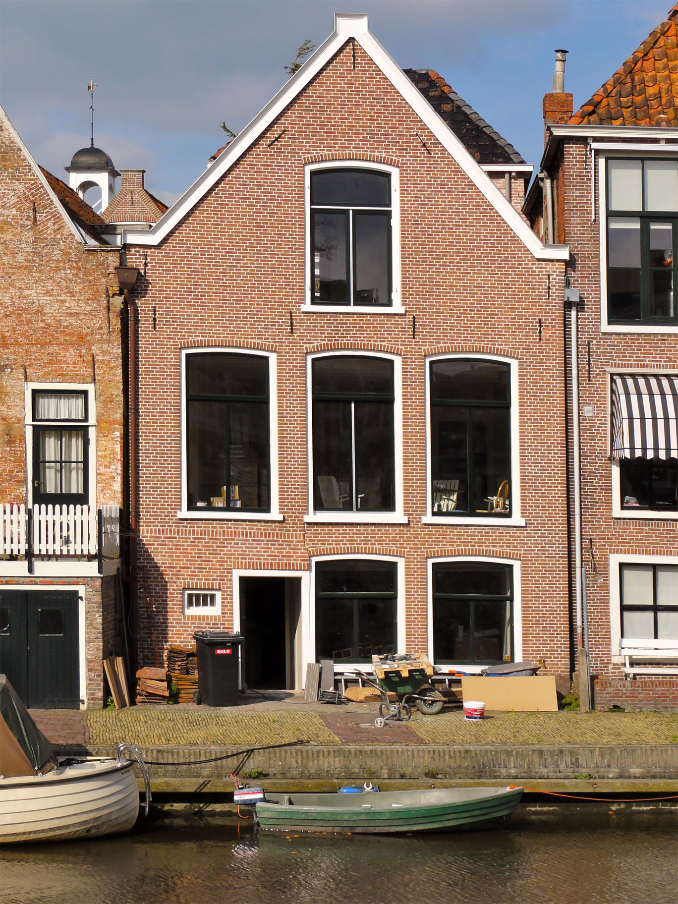 Achtergevel Nauwstraat 11 Dokkum, rijksmonument